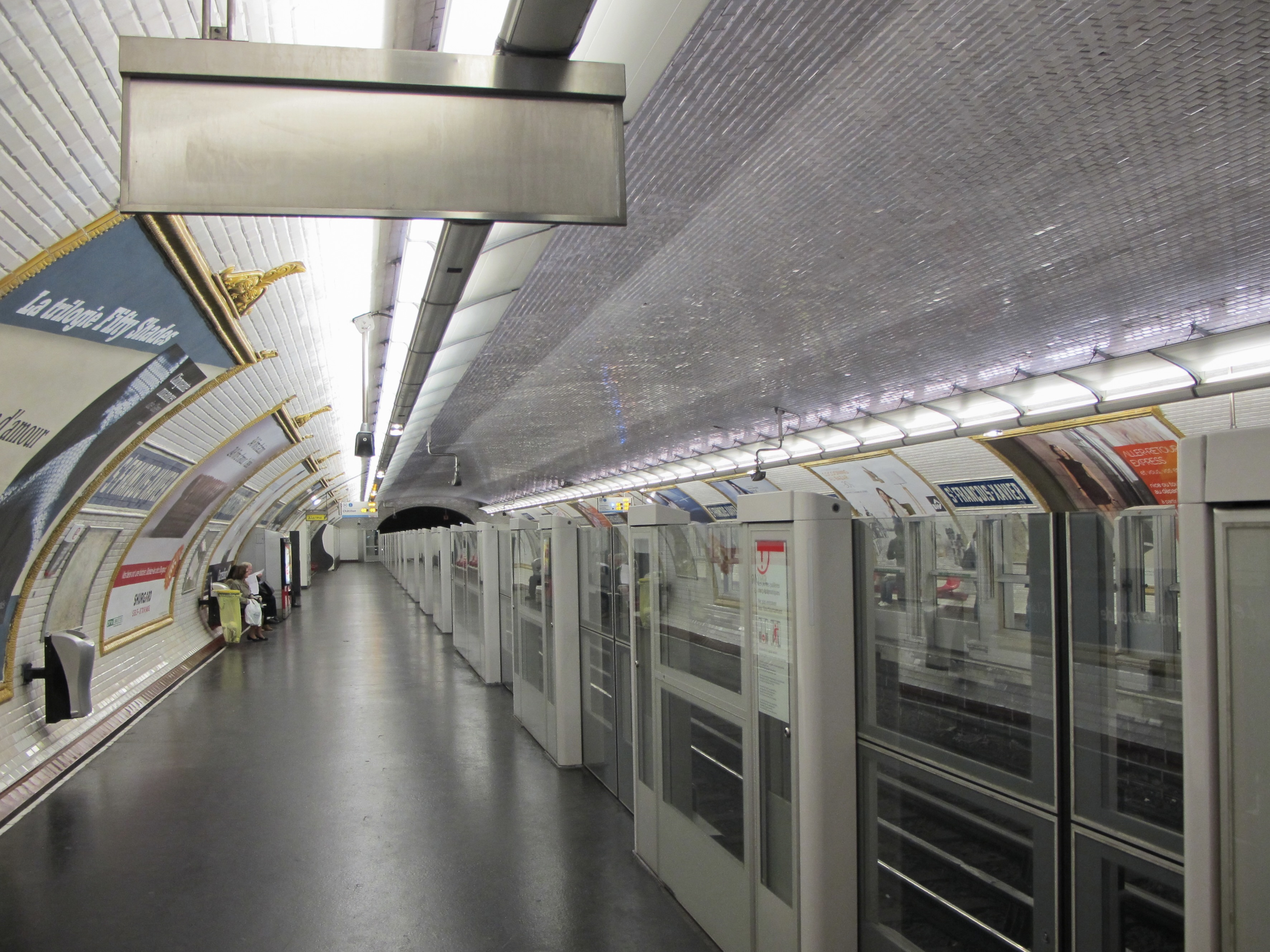 Station de métro Saint-François-Xavier (Paris Metro ligne 13) métro de Paris, France